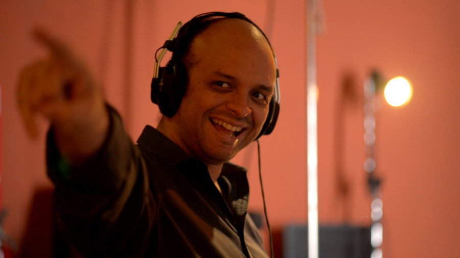 Luichy Guzmán durante la grabación de la banda sonora de la película Quiero ser fiel.